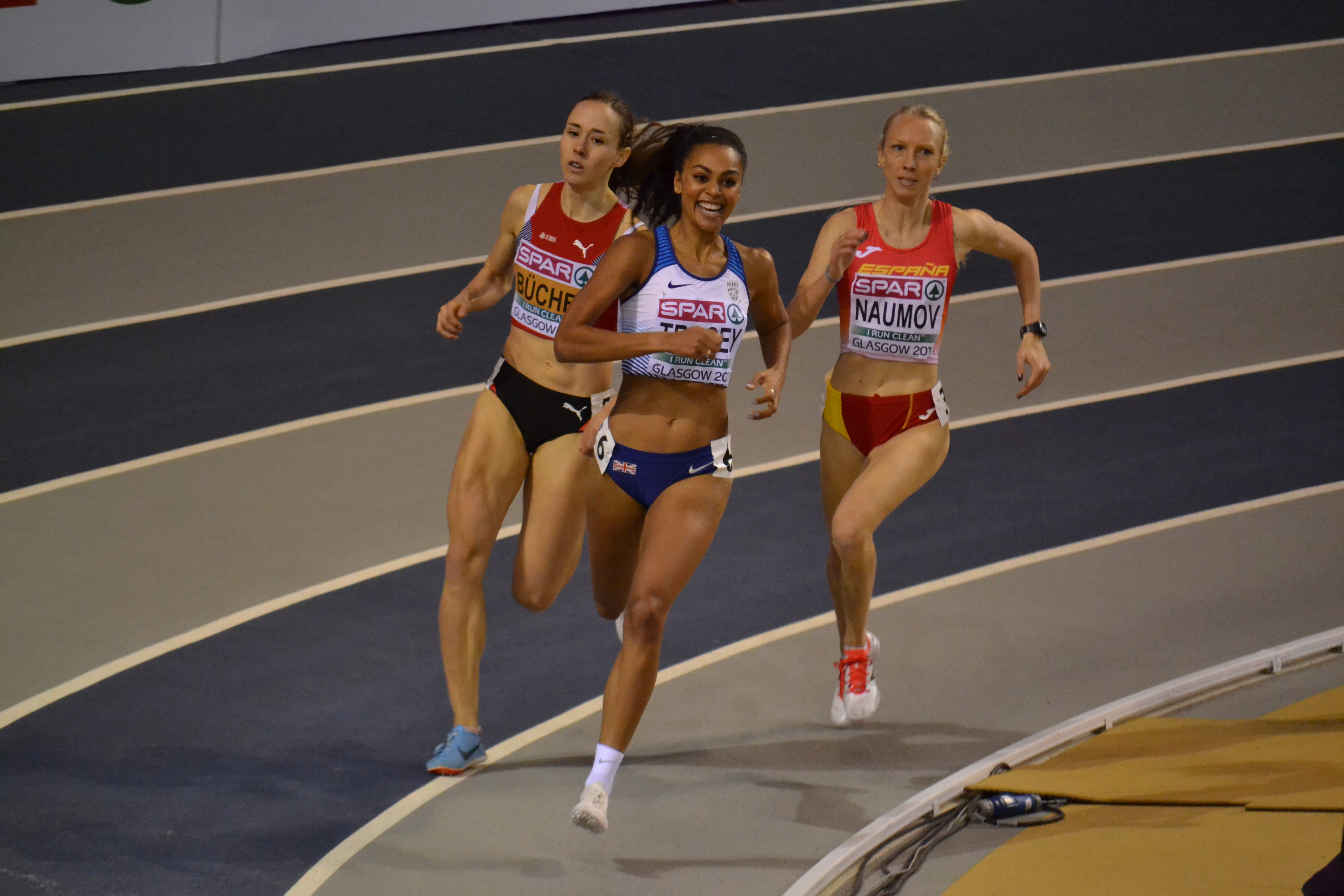 Womens 800m